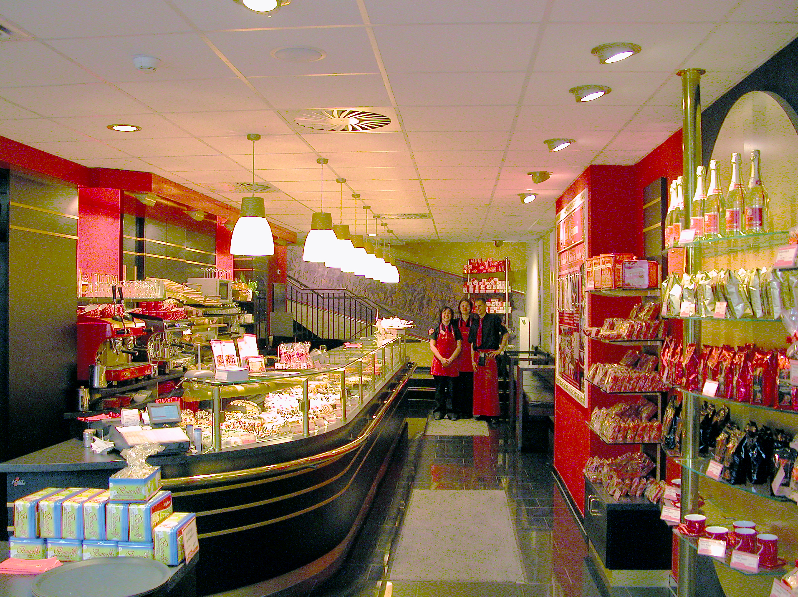 20.06.2009 01067 Dresden-Neumarkt: An der Frauenkirche 18. Moderner Neubau 2008. Confiserie im EG. [DSCN37990.TIF]20090620080DR.JPG(c)Blobelt